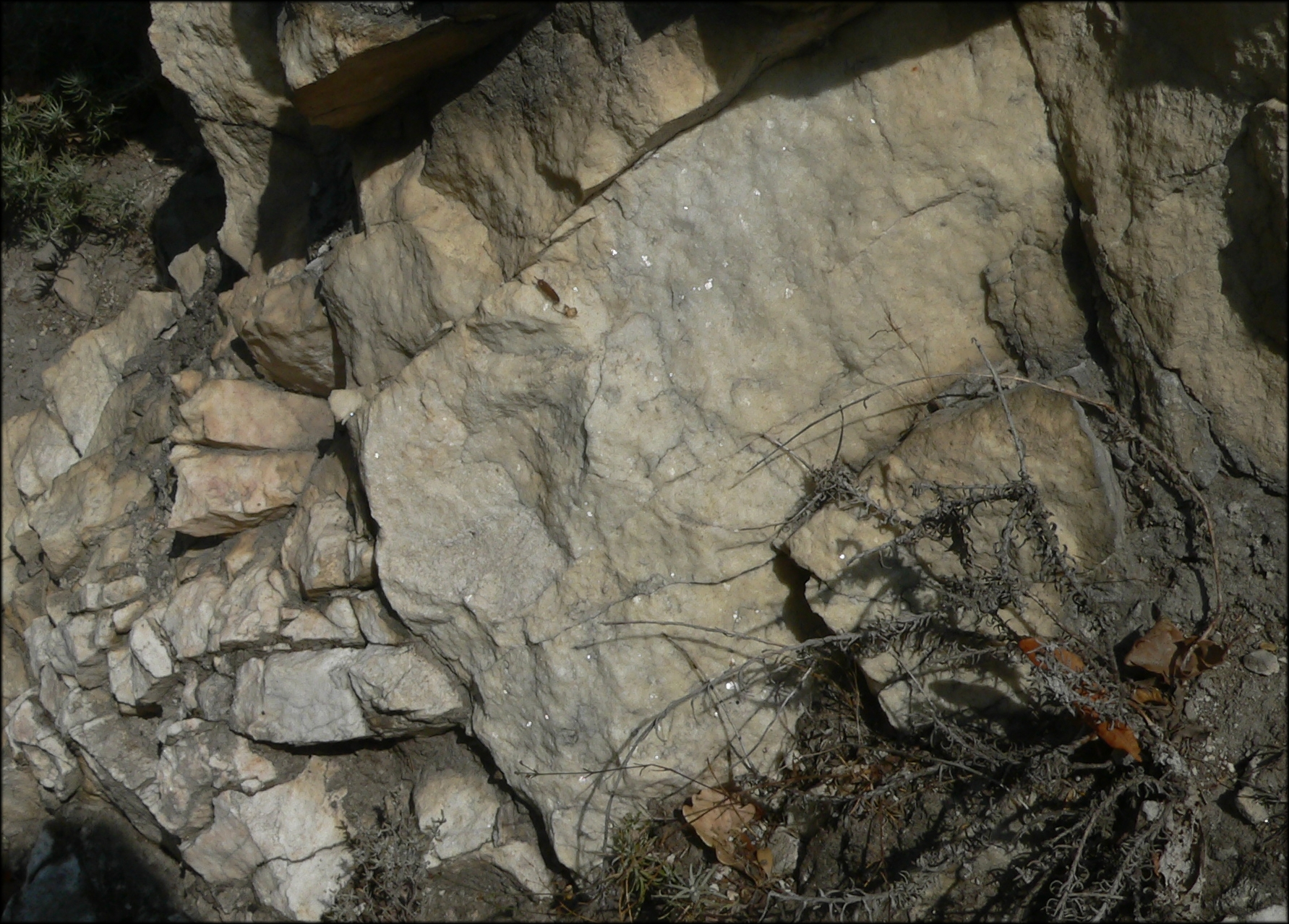 Marble, Pyrennees